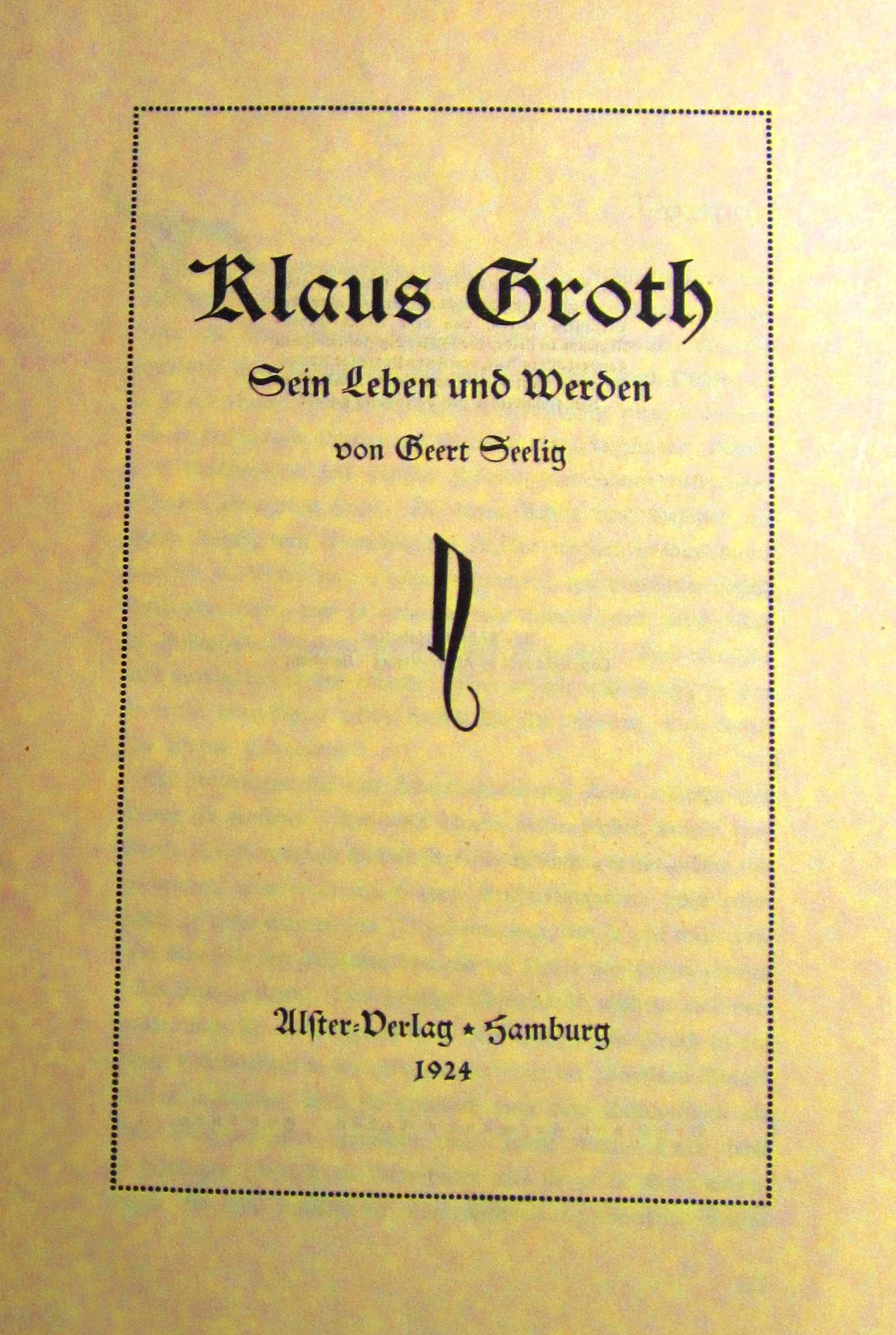 Titelblatt des Buches Klaus Groth von Geert Seelig, Hamburg 1924